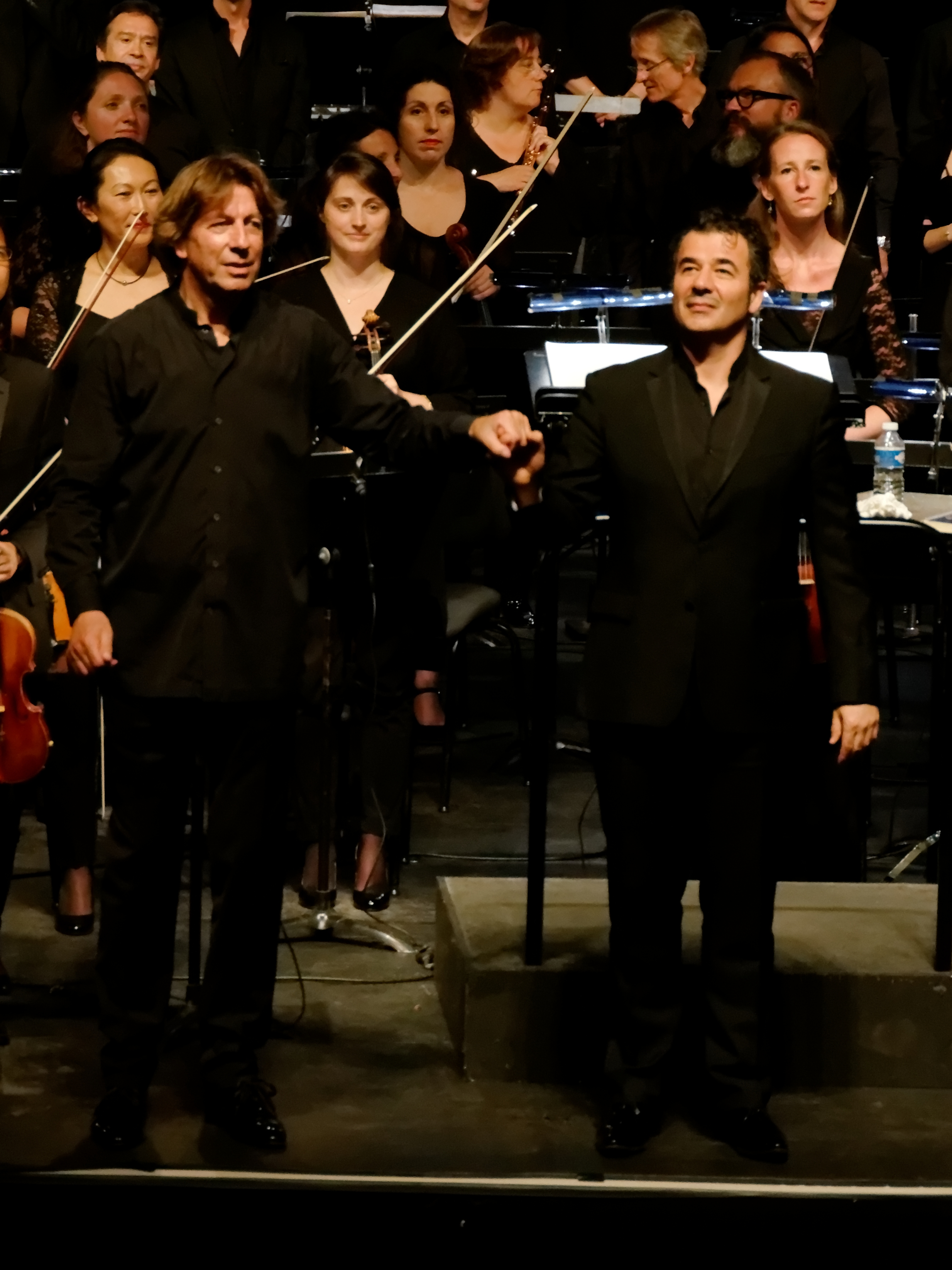 Ernst van Tiel et Ludovic Bource. Ciné-concert de The Artist à l'auditorium de Lyon.